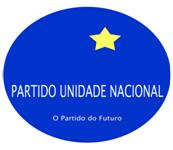 Logo der Partido Unidade Nacional